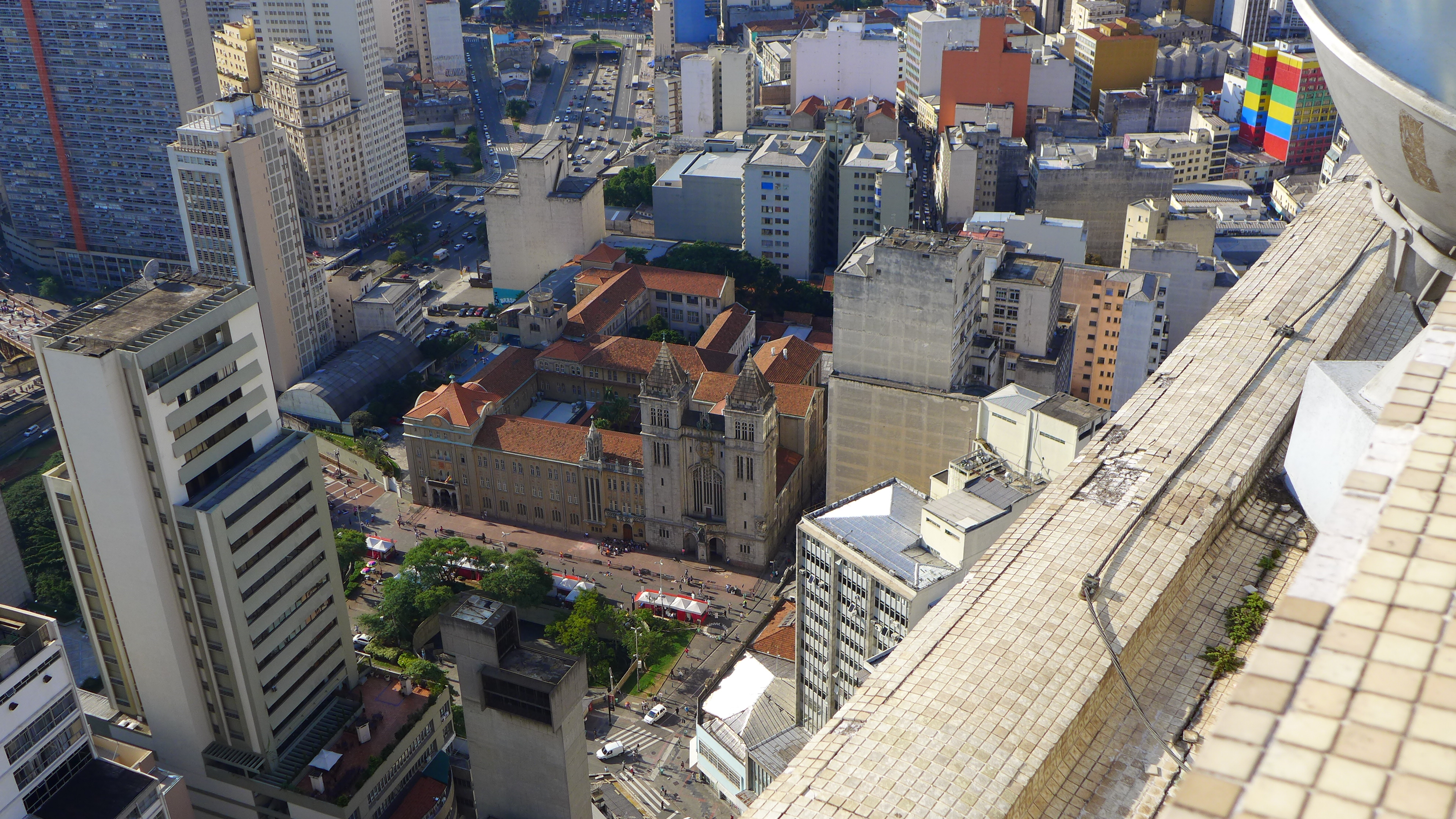 Vista aérea da cúpula da lanterna do Edifício Arantes. Abaixo Mosteiro de São Bento